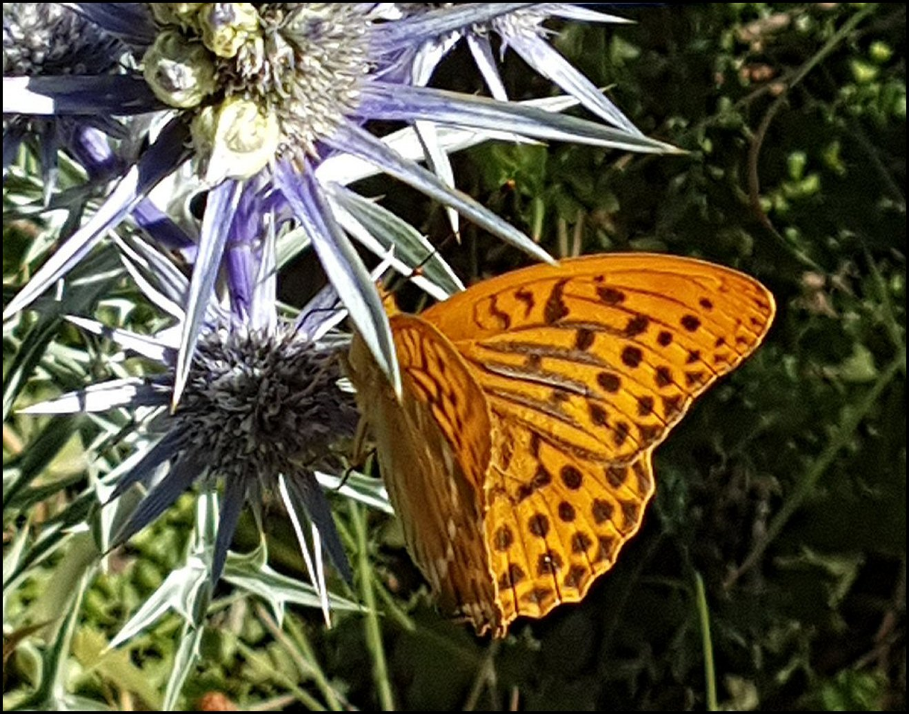 Mâle de Tabac d' Espagne, Argynnis paphia, butinant une inflorescence d' Eryngium bourgatii. Cerdagne, Occitanie. Observation Benoit Lopez, 2017.